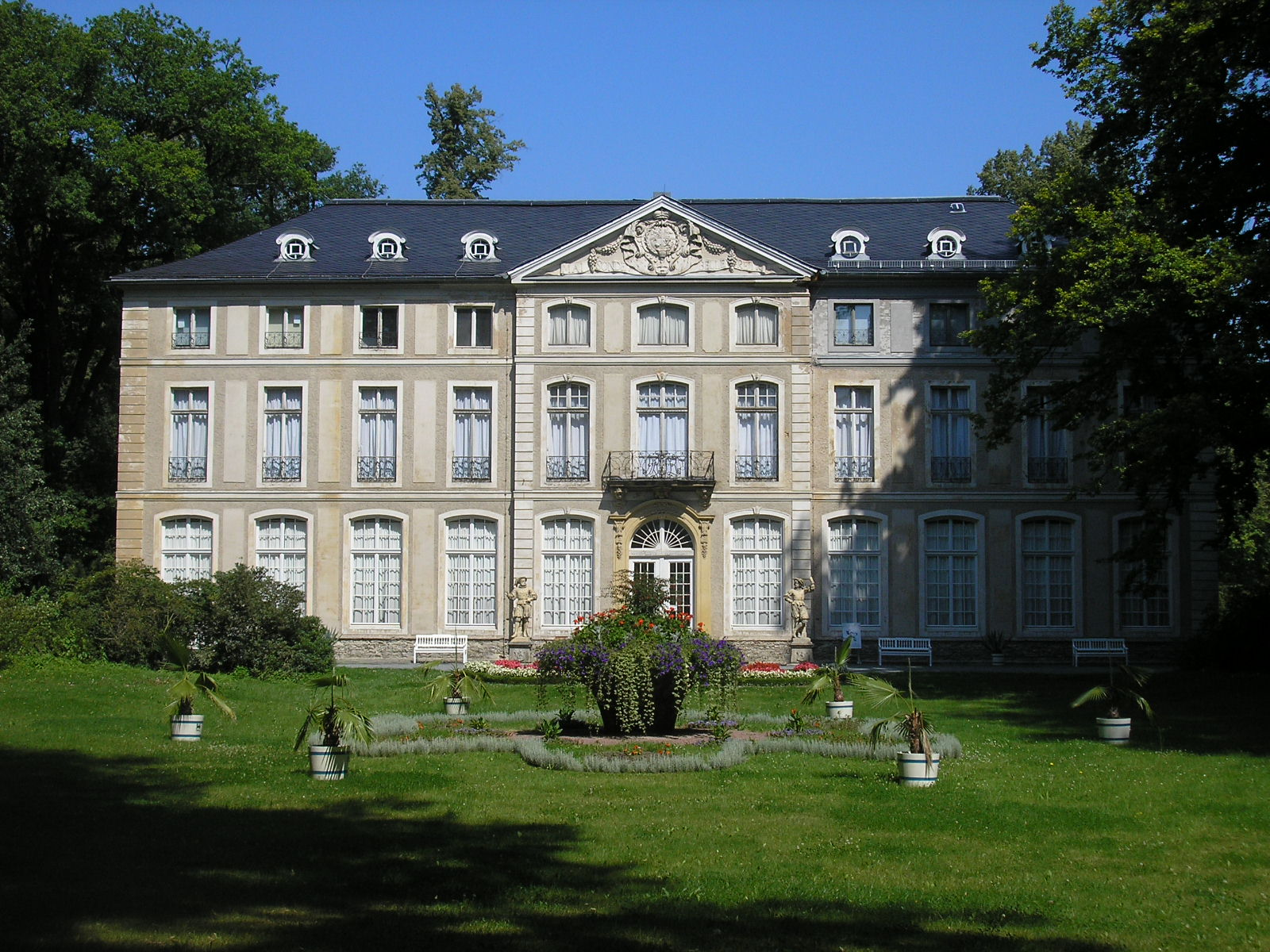 Das Sommerpalais in Greiz (Thüringen).